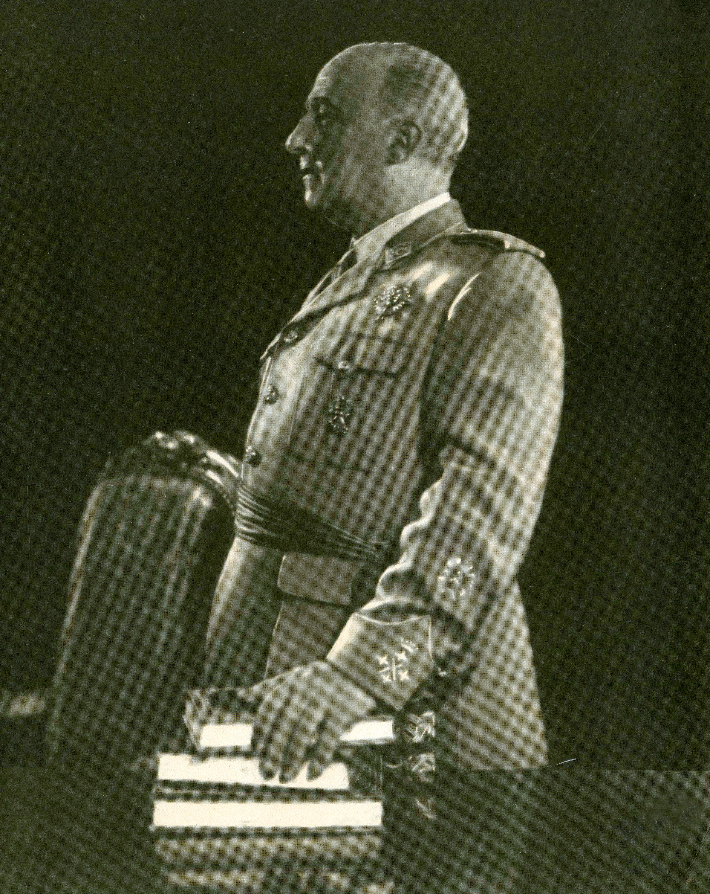 Retrato del Generalísimo.